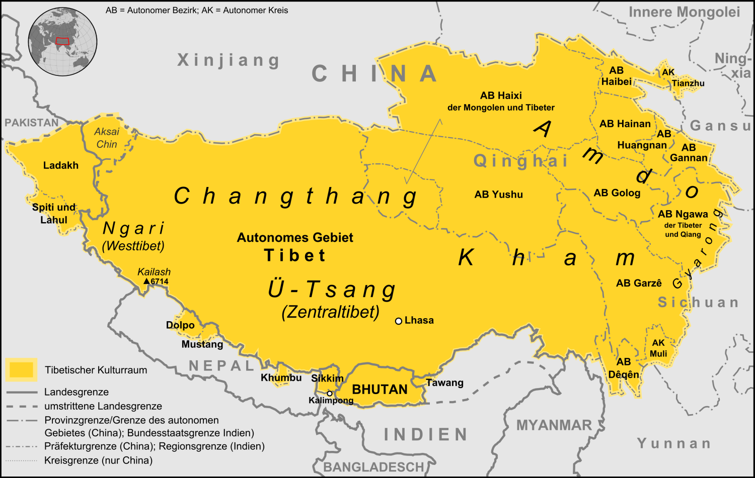 Karte des Tibetischen Kulturraums